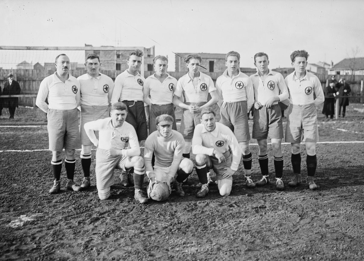 Equipe de football du Red Star Strasbourg avant un match à rejouer des 16èmes de finale de la Coupe de France 1922-1923 à Asnières contre le Football Etoile Club de Levallois (match perdu 2-0).